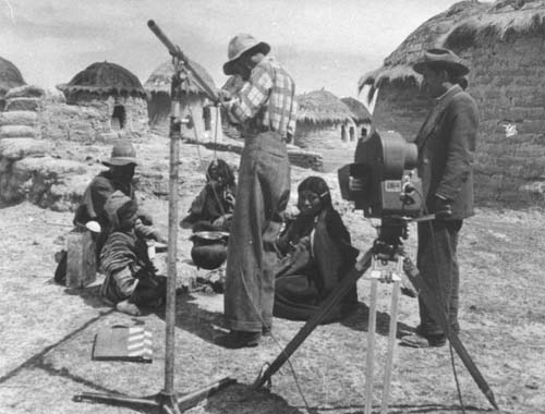 Filmación de "Vuelve Sebastiana" del cineasta boliviano Jorge Ruiz (1954)